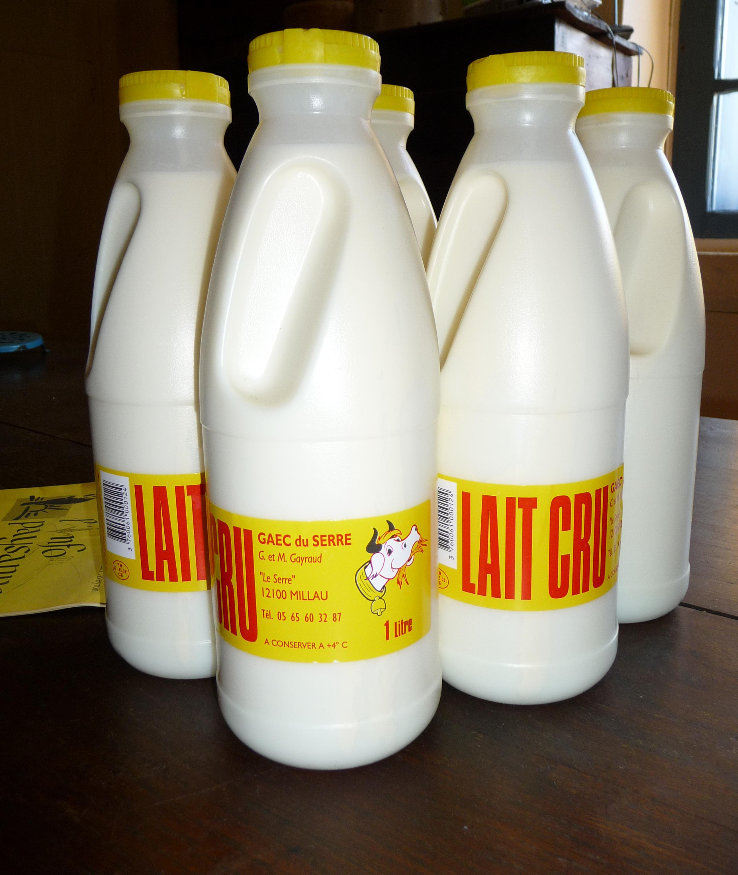 Lait cru de vache commercialisé dans le Massif central, Aveyron, France.